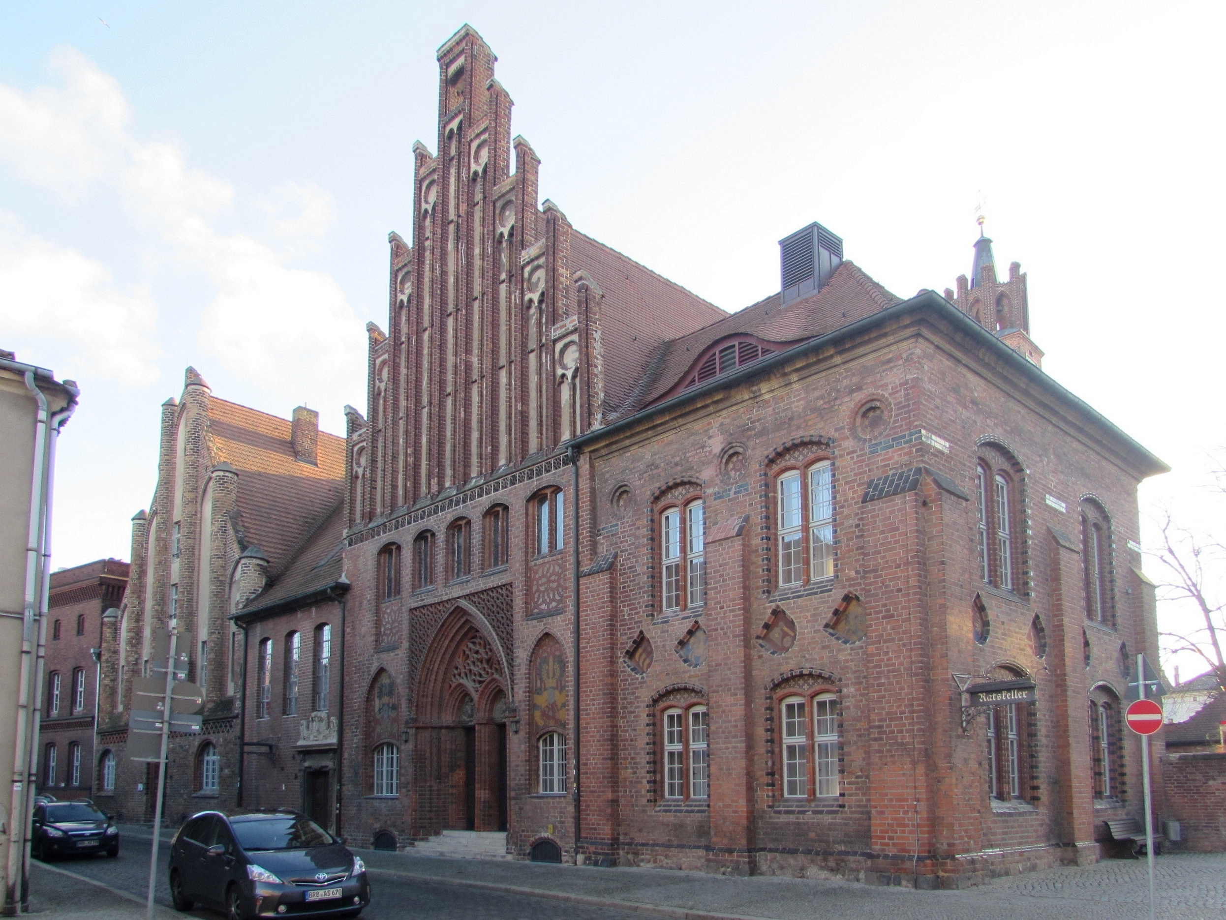 altstädtisches rathaus brandenburg rückansicht